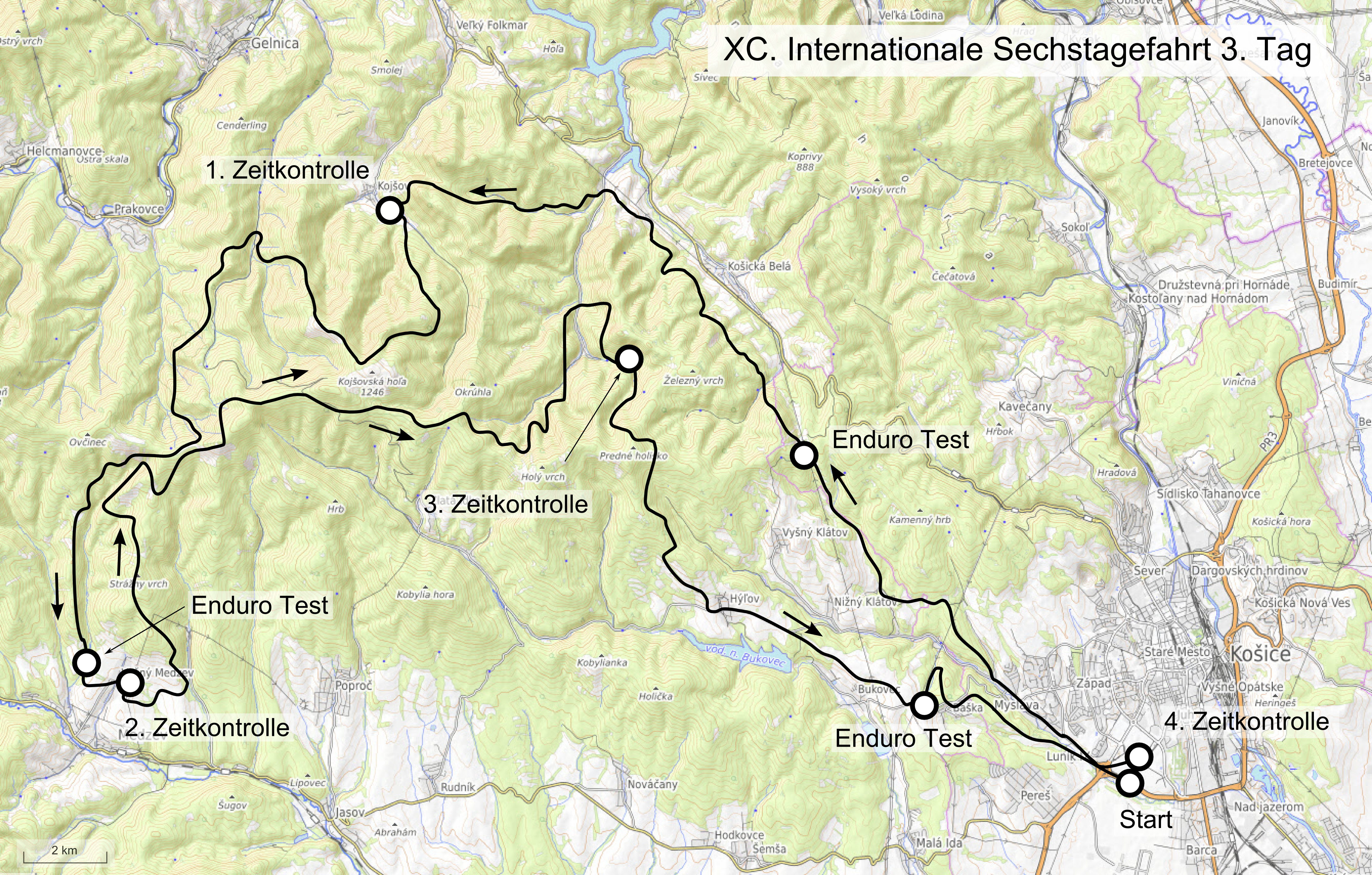 Karte der 90. Internationale Sechstagefahrt, Route des 3. Tages